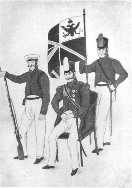 Дипломатическая миссия Е. В. Путятина в Японии, 1854-1855